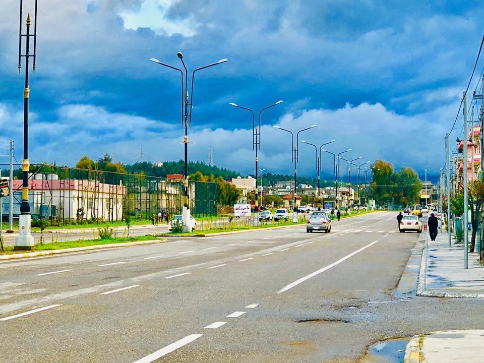 کوردی: وێنەی شەقامێکی سەرەکی زەڕایەن